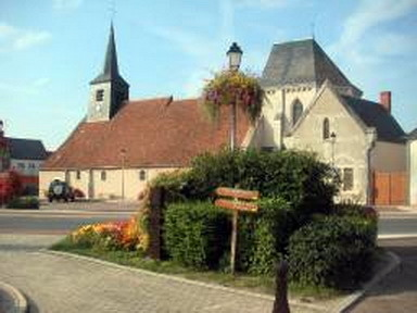 Eglise de Varennes-Changy - 2005